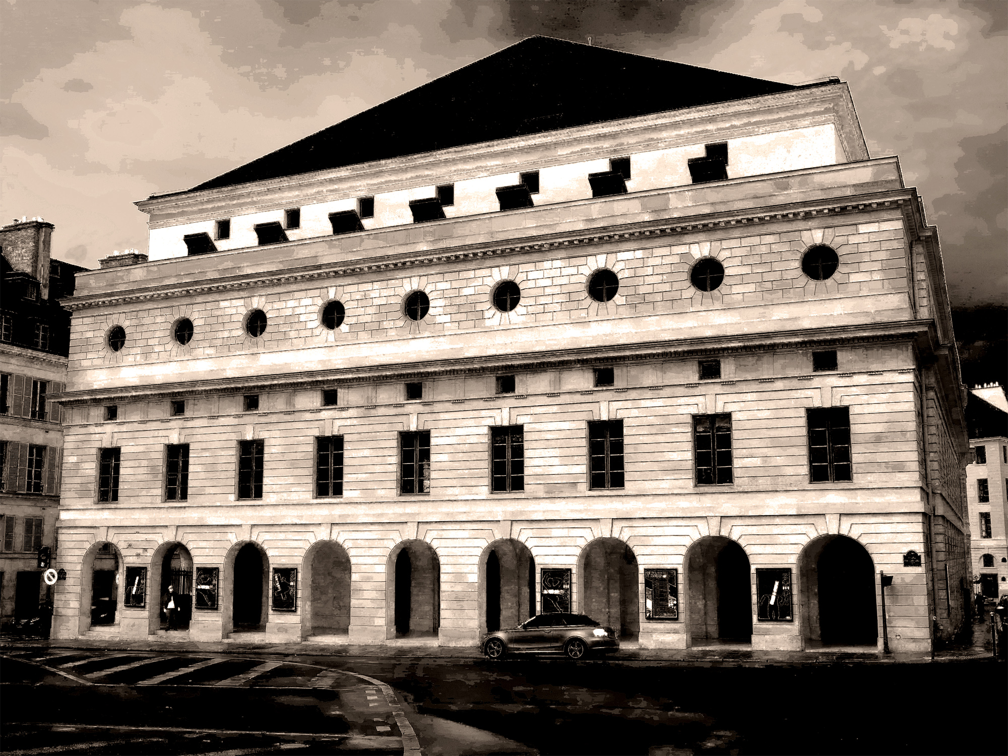 Théâtre de l'Odéon, côté place Paul-Claudel - Paris VI .